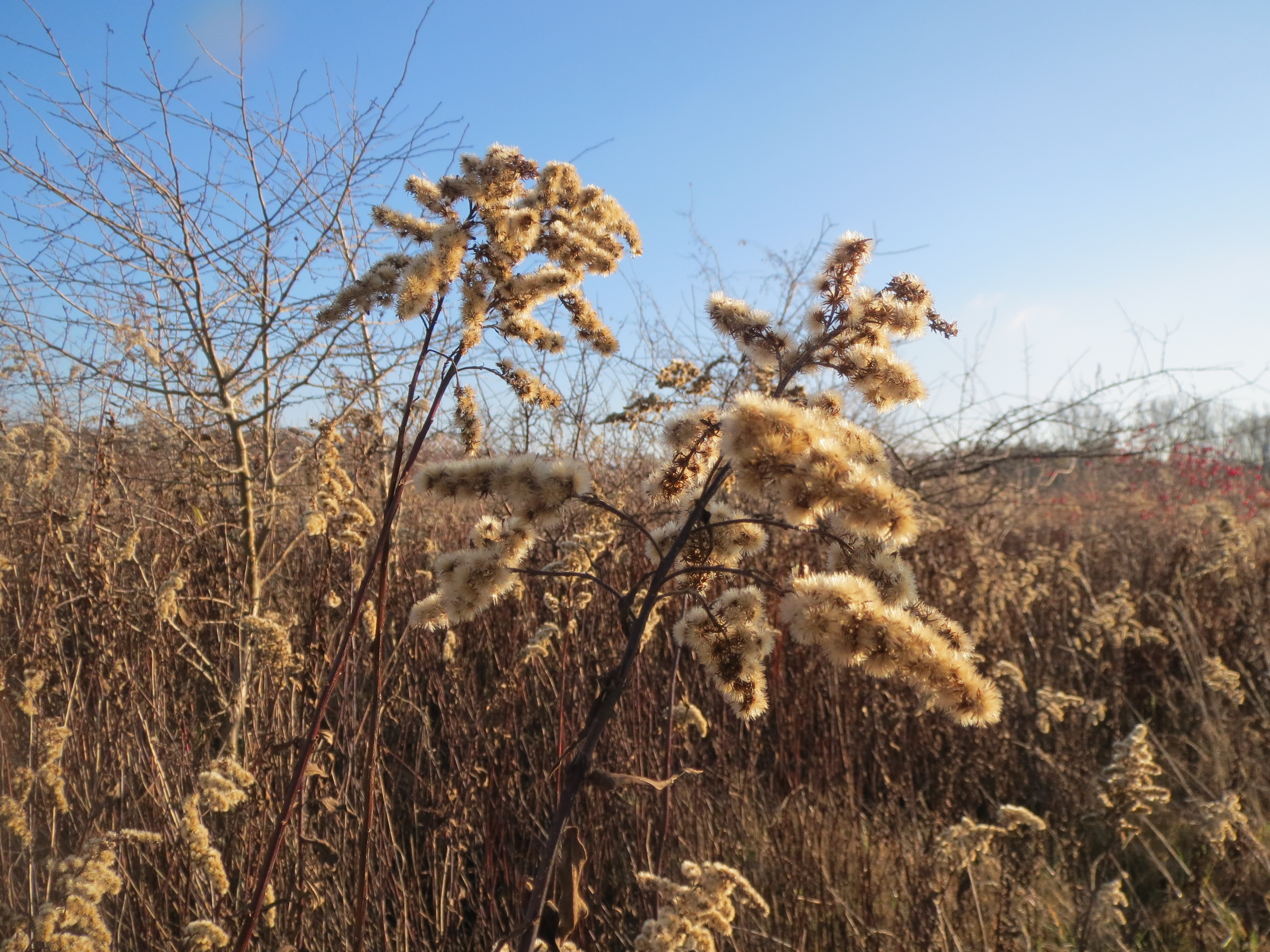 Kanadische Goldrute (Solidago canadensis) im Naturschutzgebiet Marlach (Hockenheim)